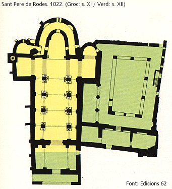 Planta del monestir. S.XI en groc, S.XII en verd.